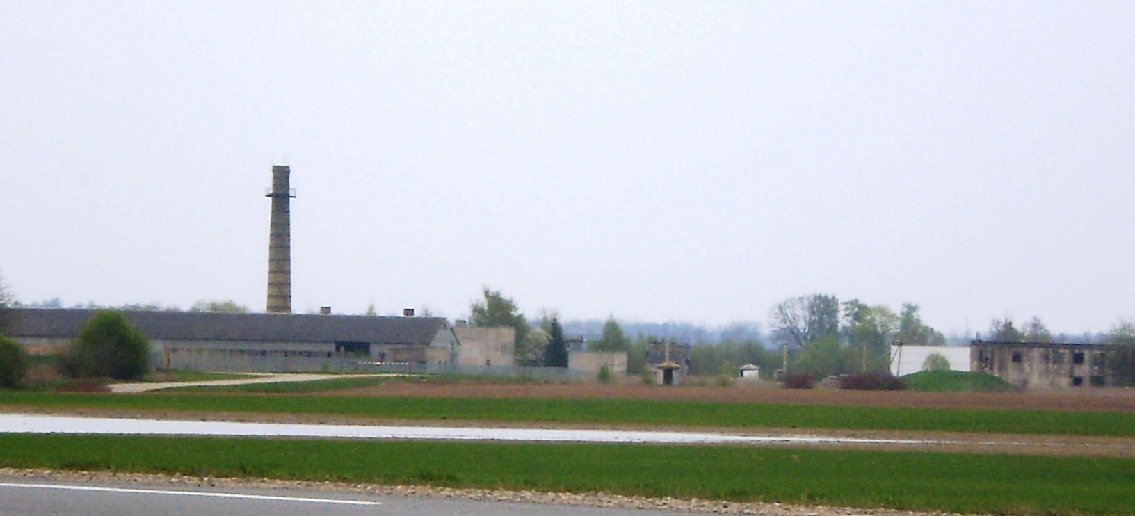 Novočėbė, Kėdainių raj.